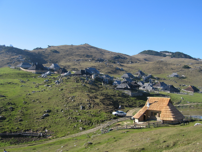 Velika planina, mala dolina